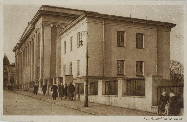 Бібліотека Львівської політехніки, фото 1930-х років